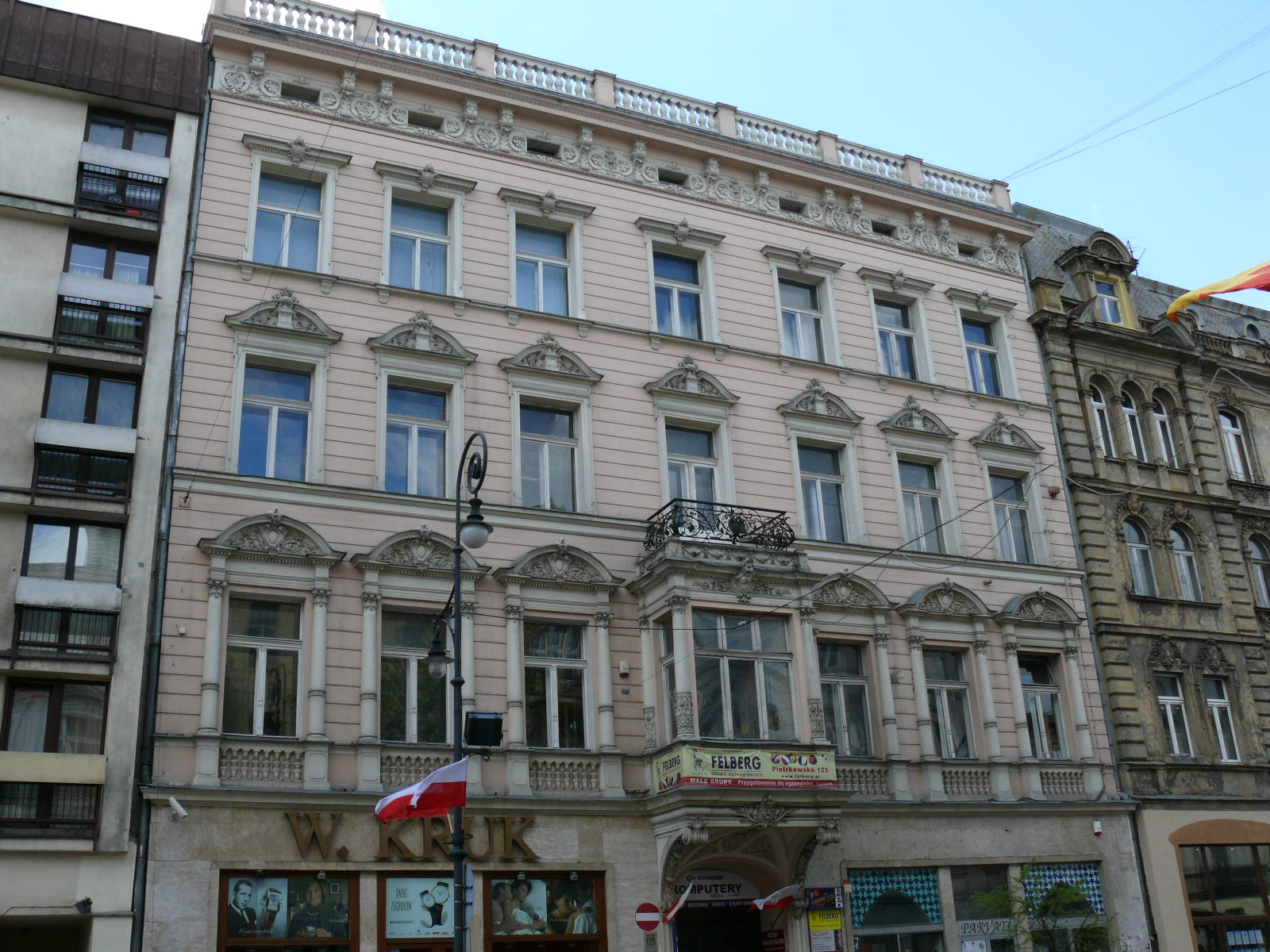 Kamienica Piotrkowska 125 w Łodzi